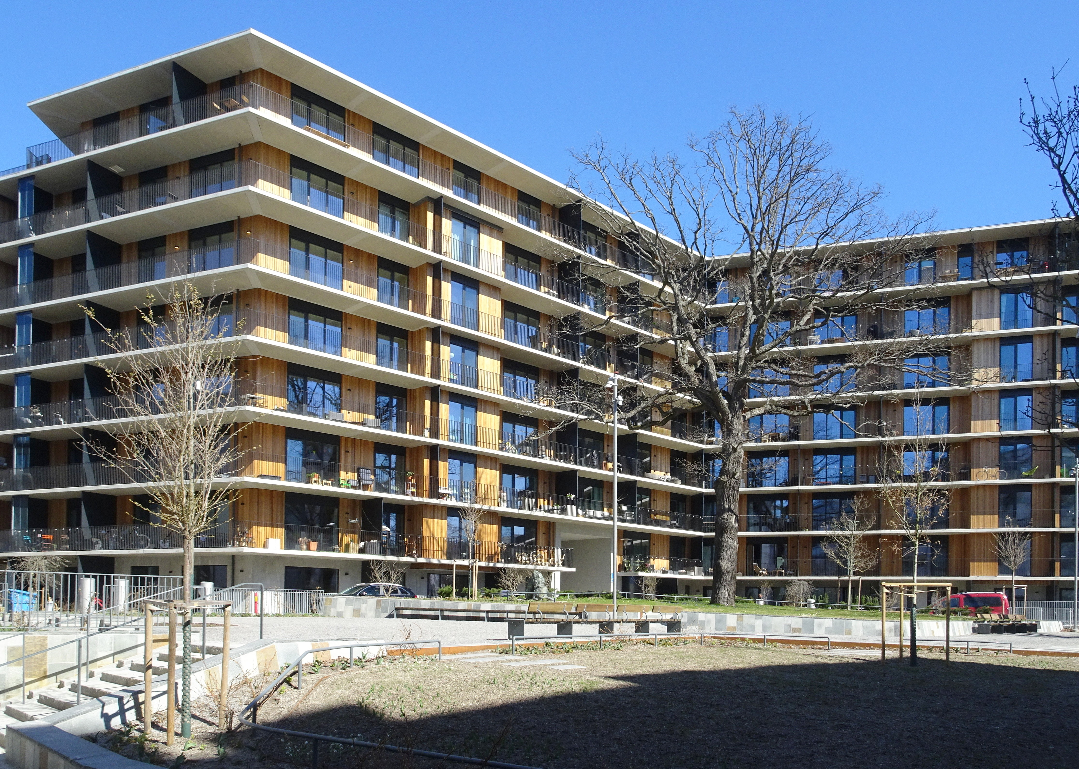 Gröndal Strand, Storsegelvägen, kvarteret Storsegeln